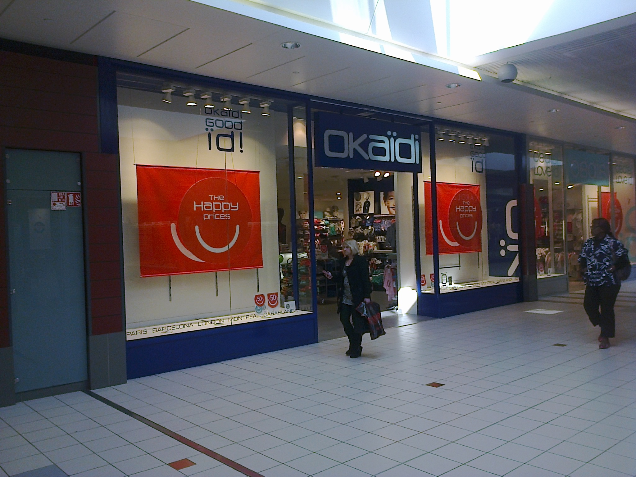 Magasin Okaïdi de Plaisir